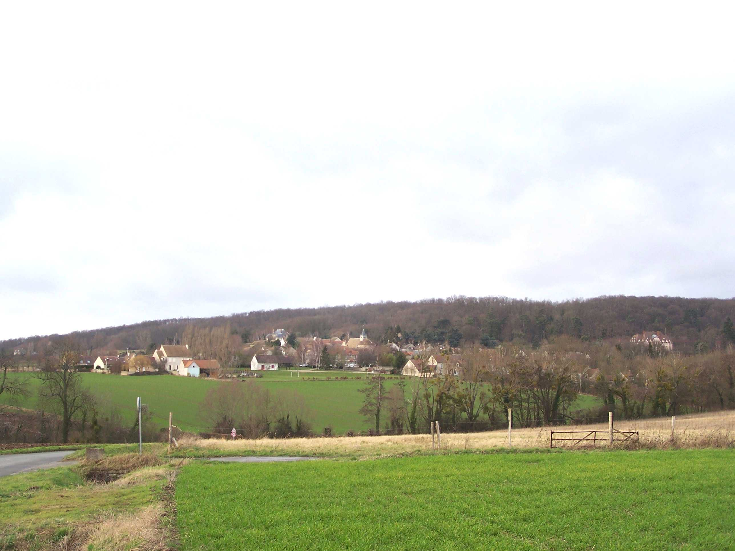 Vue est du village d'Herbeville (Yvelines, France)